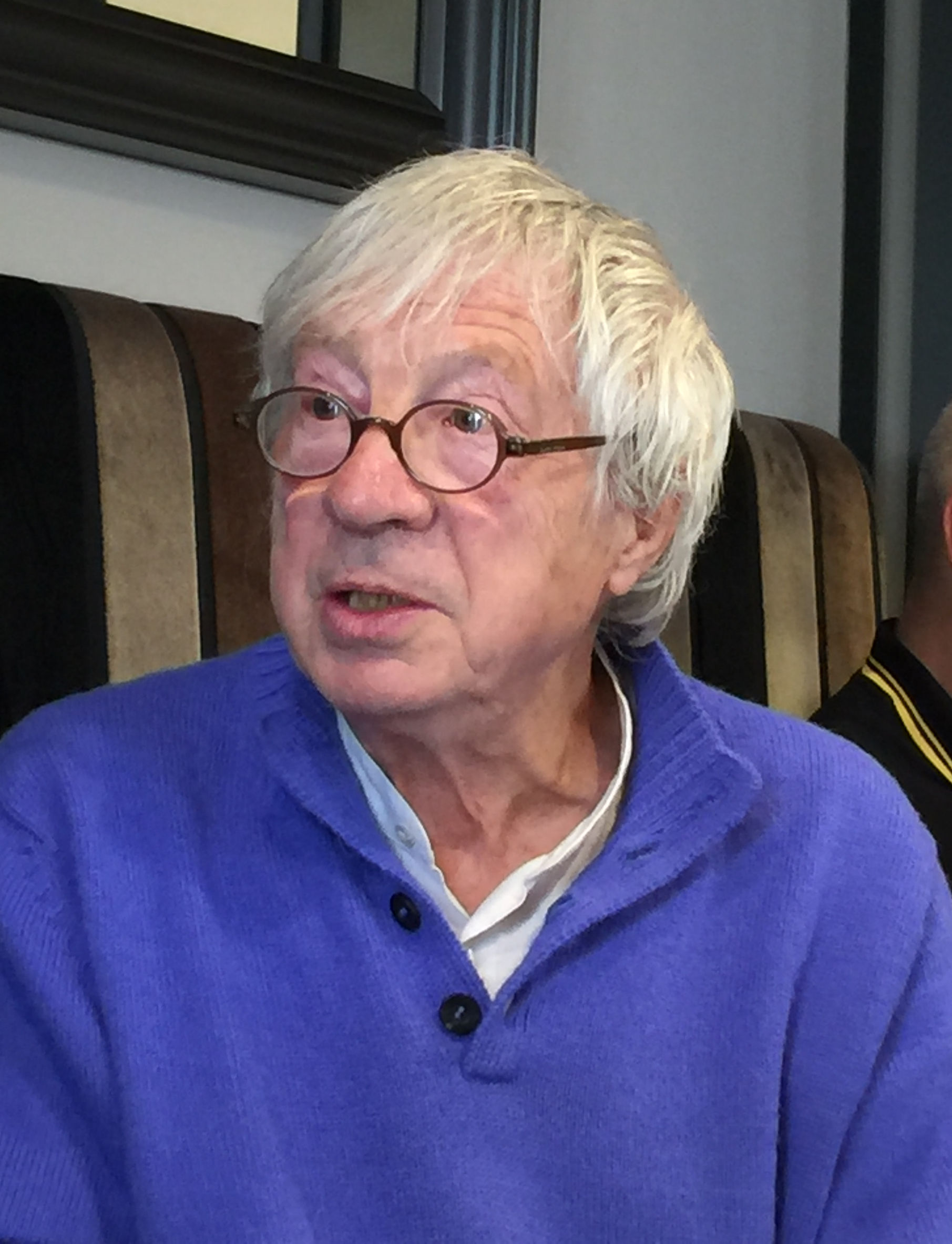 Jean-Louis Fournier le 26/05/2016